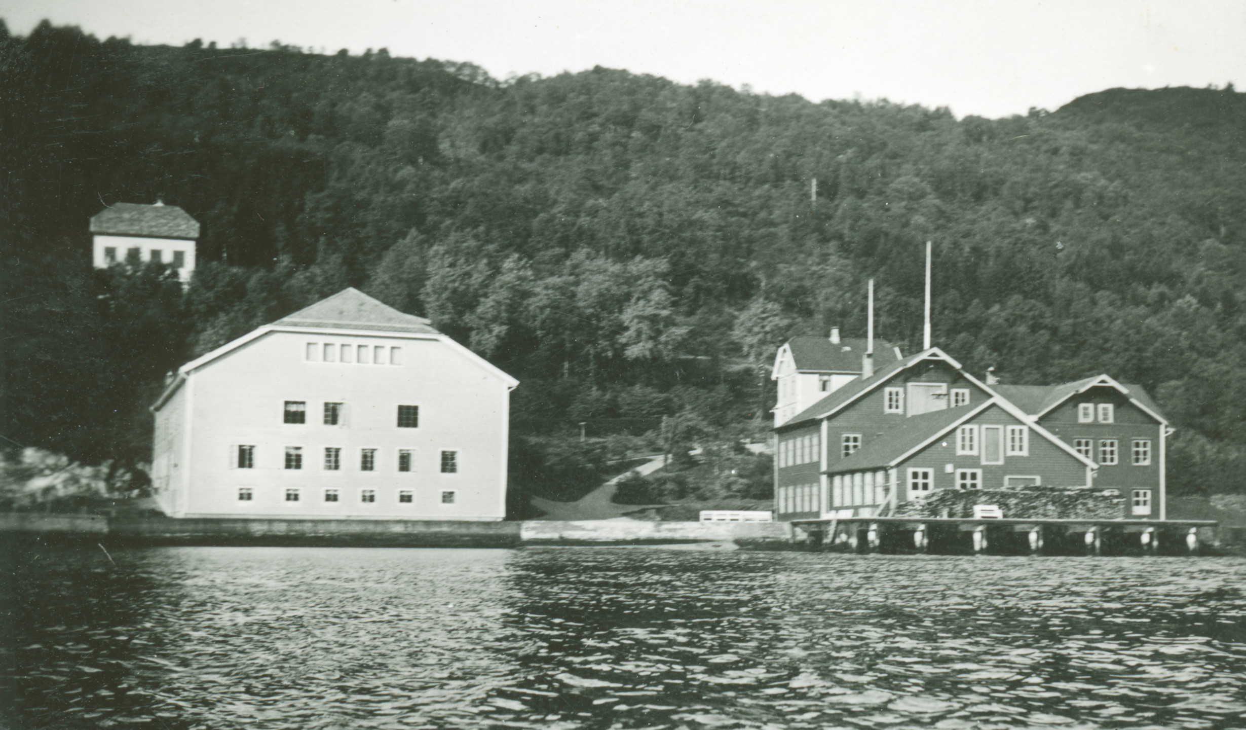 Statens Husindustriskole i Ytre Arna i 1940